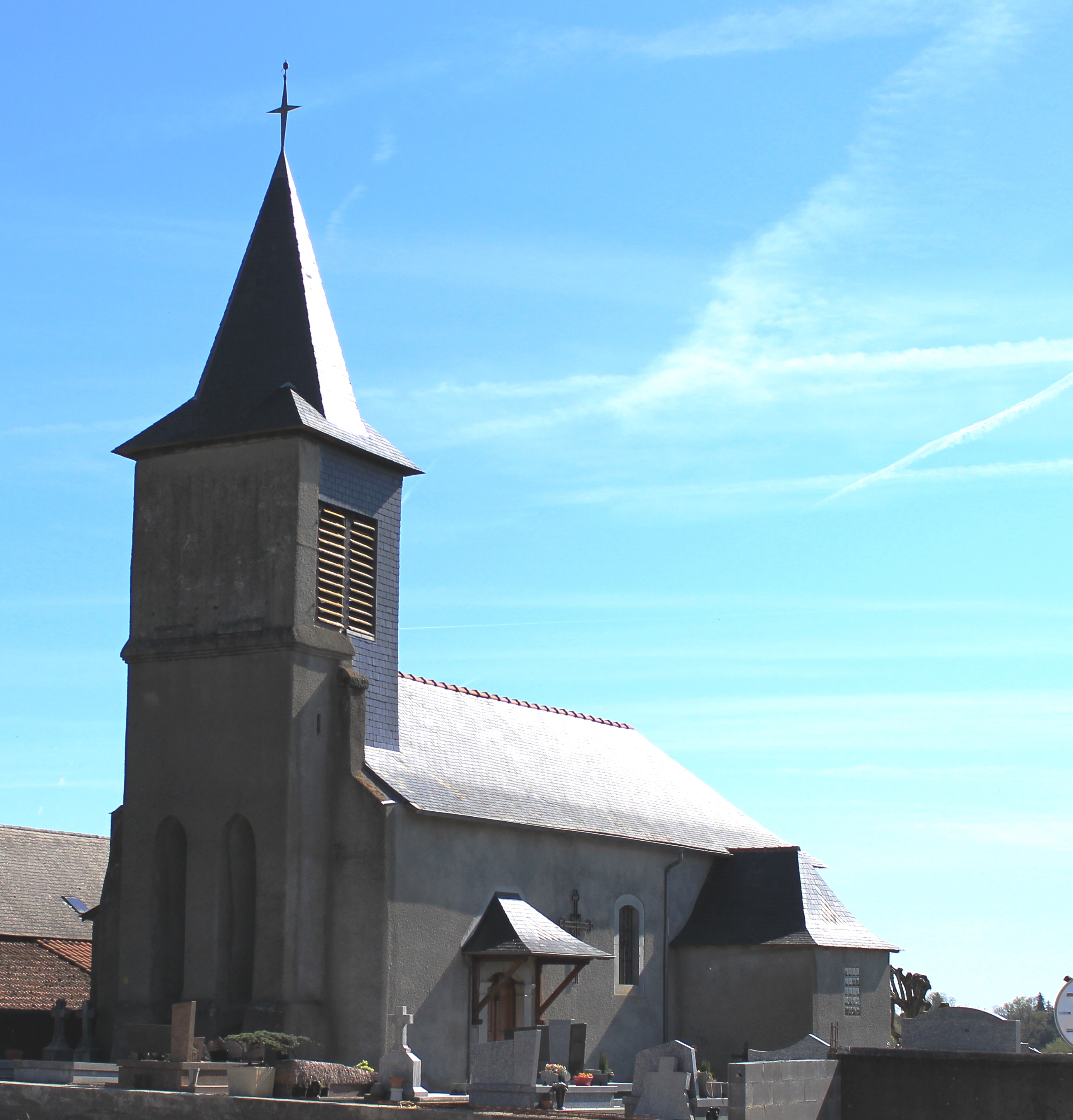 Église Saint-Michel de Lizos (Hautes-Pyrénées)